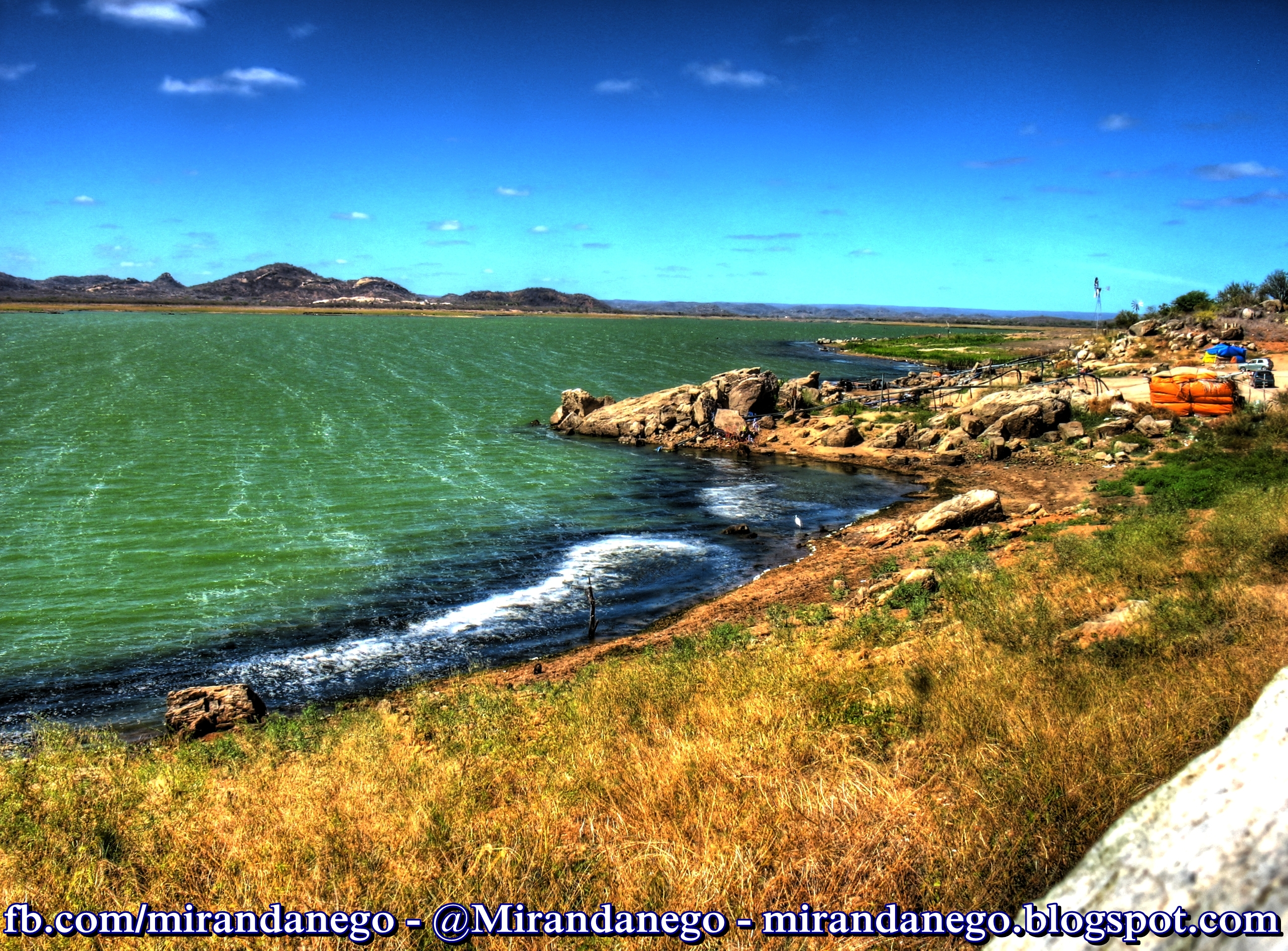 Margens da barragem boqueirão em Parelhas